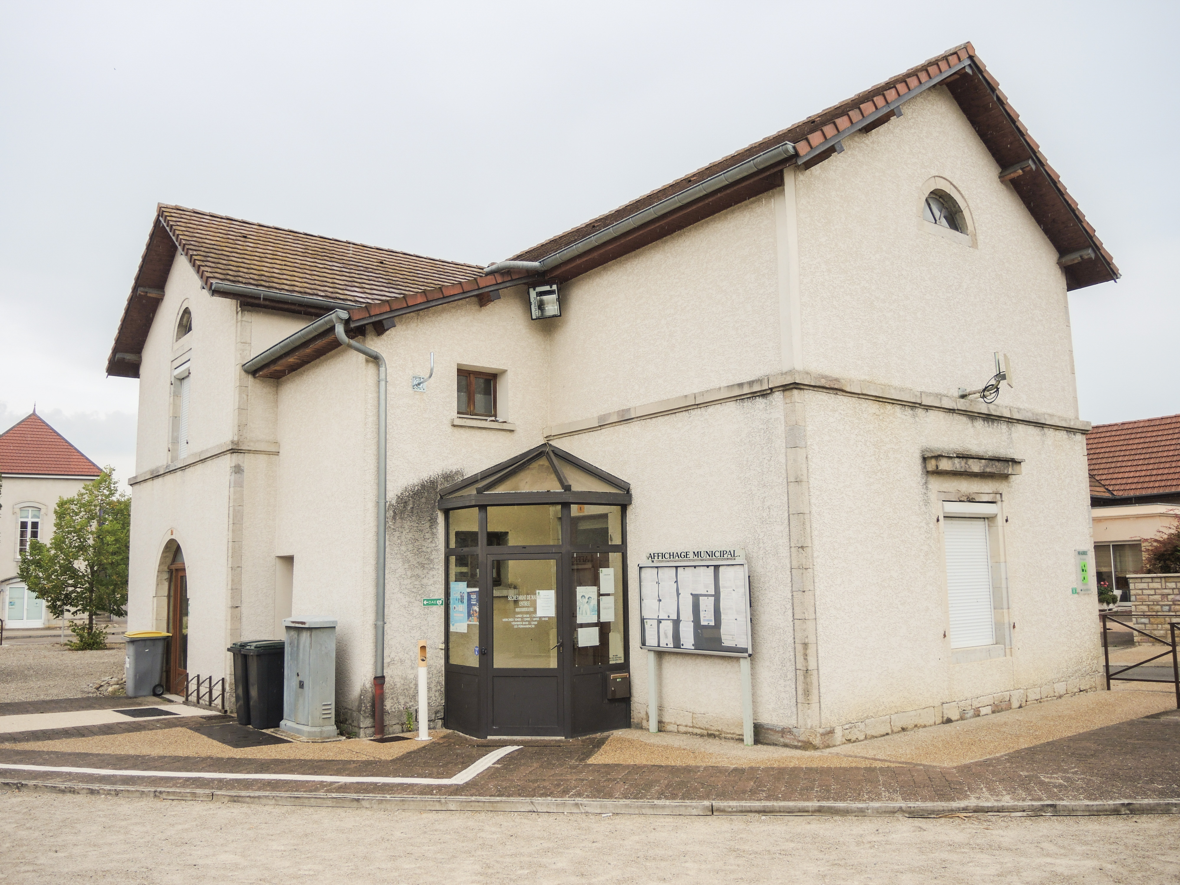 Mairie de Pouligney. Doubs